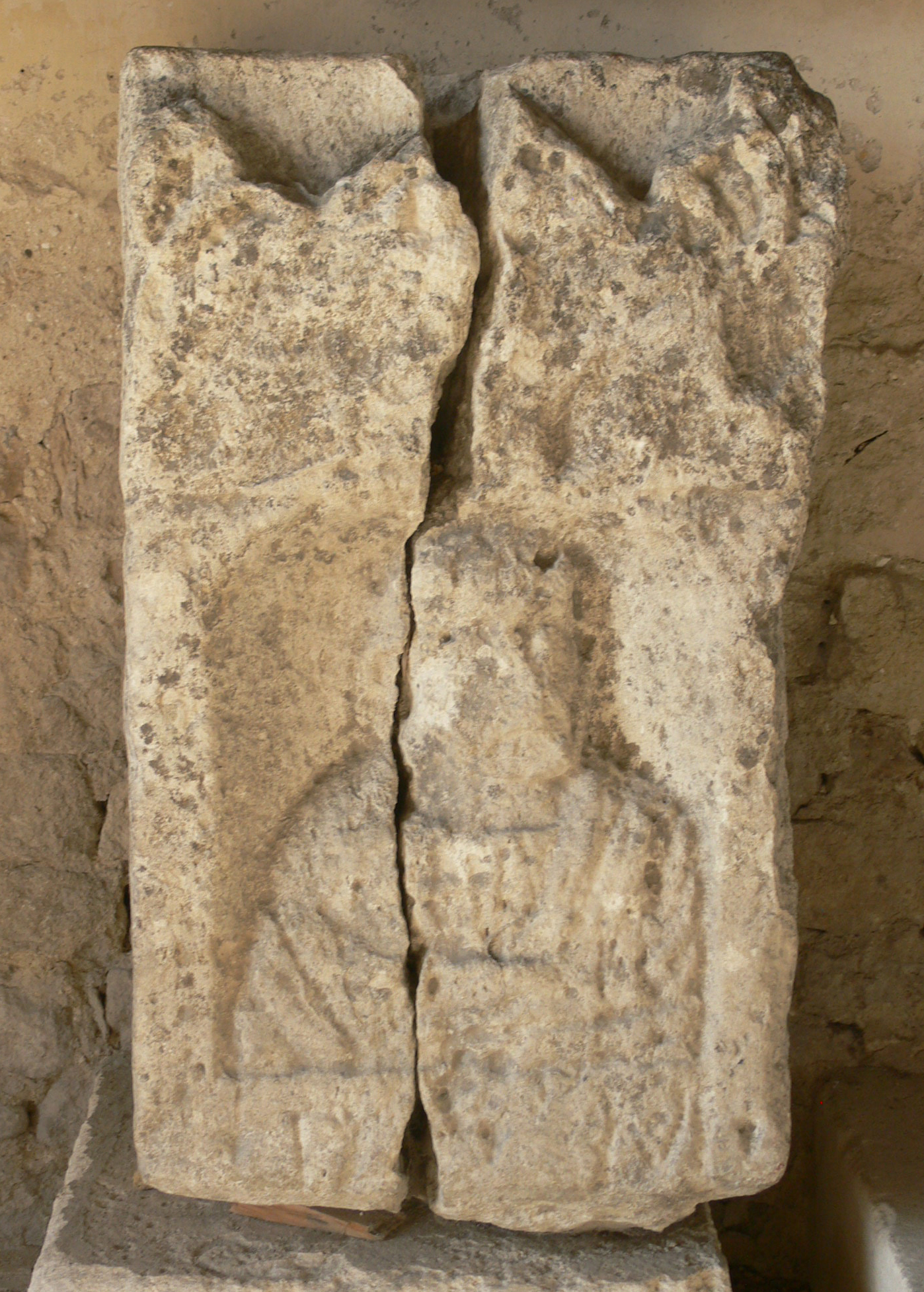 Prieuré du Val des Nymphes : stèle funéraire d'époque romaine retrouvée au Val des Nymphes et conservée dans l'église de La Garde-Adhémar. Texte latin : "D(iis) M(anibus) /[...]" - CAG 26, p. 368